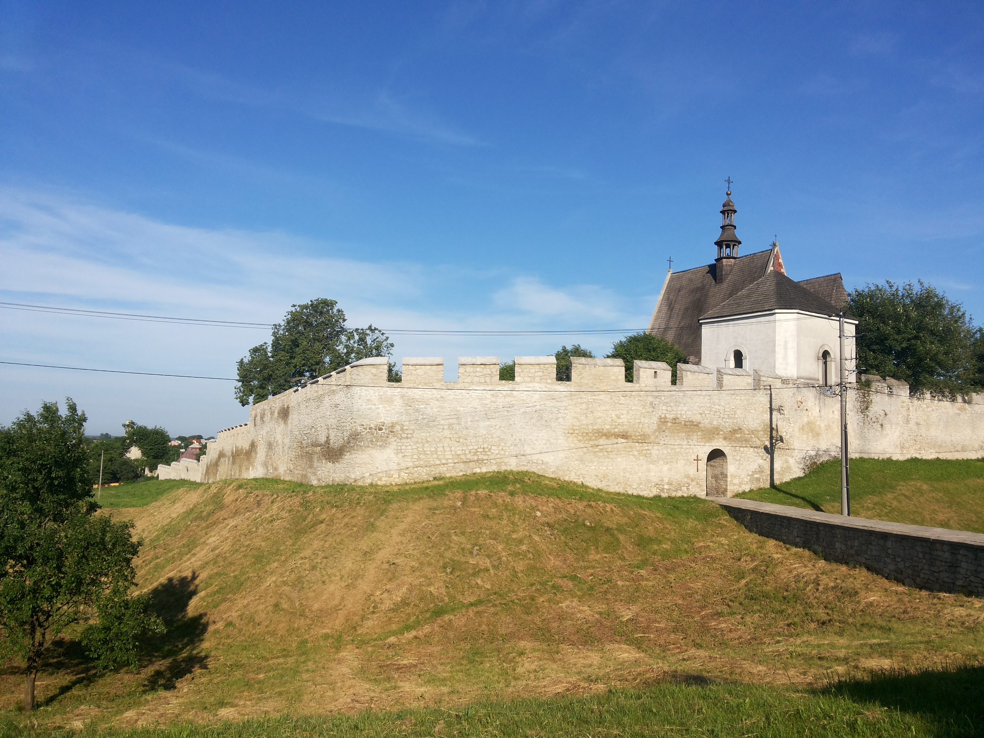 Szydłów, zespół kościoła par. pw. św. Władysława, XIV, XVII w., po 1945 r.